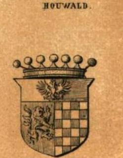 Wappen der Freiherrn von Houwald nach Siebmacher Band 3